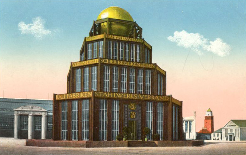 Internationale Baufach-Ausstellung 1913 Leipzig, Monument des Eisens mit Aufschriften Stahlwerksverband, Verein deutscher Brücken- u. Eisen, Bau-Fabriken Stahlwerks Verband ...